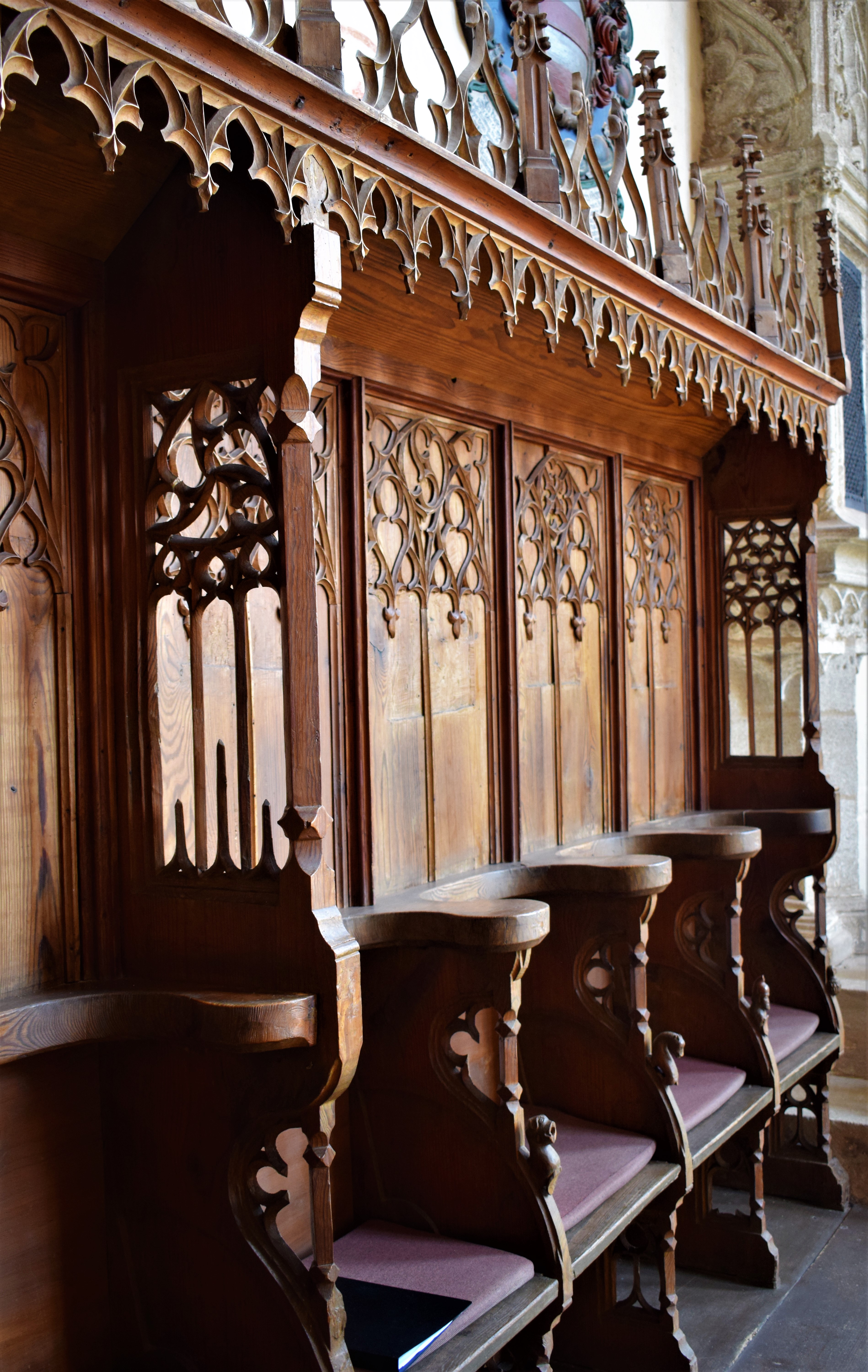 Rieterkirche Kalbensteinberg: Chorgestühl an der Nordseite des Chores